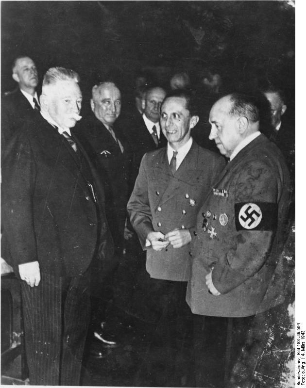 Berlin, 25 Jahre UFA ADN-ZB/Arch, 25jähriges Bestehen der UFA Anläßlich dieses Jubiläums fand im "UFA-Palast am Zoo" am 4.3.1943 ein "Betriebsappell" statt. (v.l.r. Dr. Alfred Hugenberg, Reichsleiter Robert Ley, Reichsminister Dr. Joseph Goebbels, Reichminister Walter Funk, und dahinter halb verdeckt UFA-Generaldirektor Ludwig Klitzsch). 1215-43 Abgebildete Personen: Funk, Walter Dr.: Reichswirtschaftsminister, Reichsbankpräsident, Deutschland Goebbels, Joseph: Reichsminister für Volksaufklärung und Propaganda, Gauleiter Berlin, Deutschland Hugenberg, Alfred Dr.: Reichsminister für Wirtschaft und Ernährung, Deutschnationale Volkspartei (DNVP), Deutschland (GND 118554565) Klitzsch, Ludwig: Generaldirektor des Scherl-Verlages und der Ufa, Deutschland Ley, Robert: Reichsorganisationsleiter, Deutsche Arbeitsfront (DAF), Generalrat der Wirtschaft, Deutschland